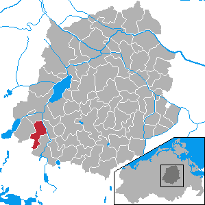 Gielow, Landkreis Demmin, Mecklenburg-Vorpommern